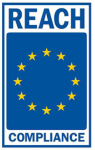 REACH